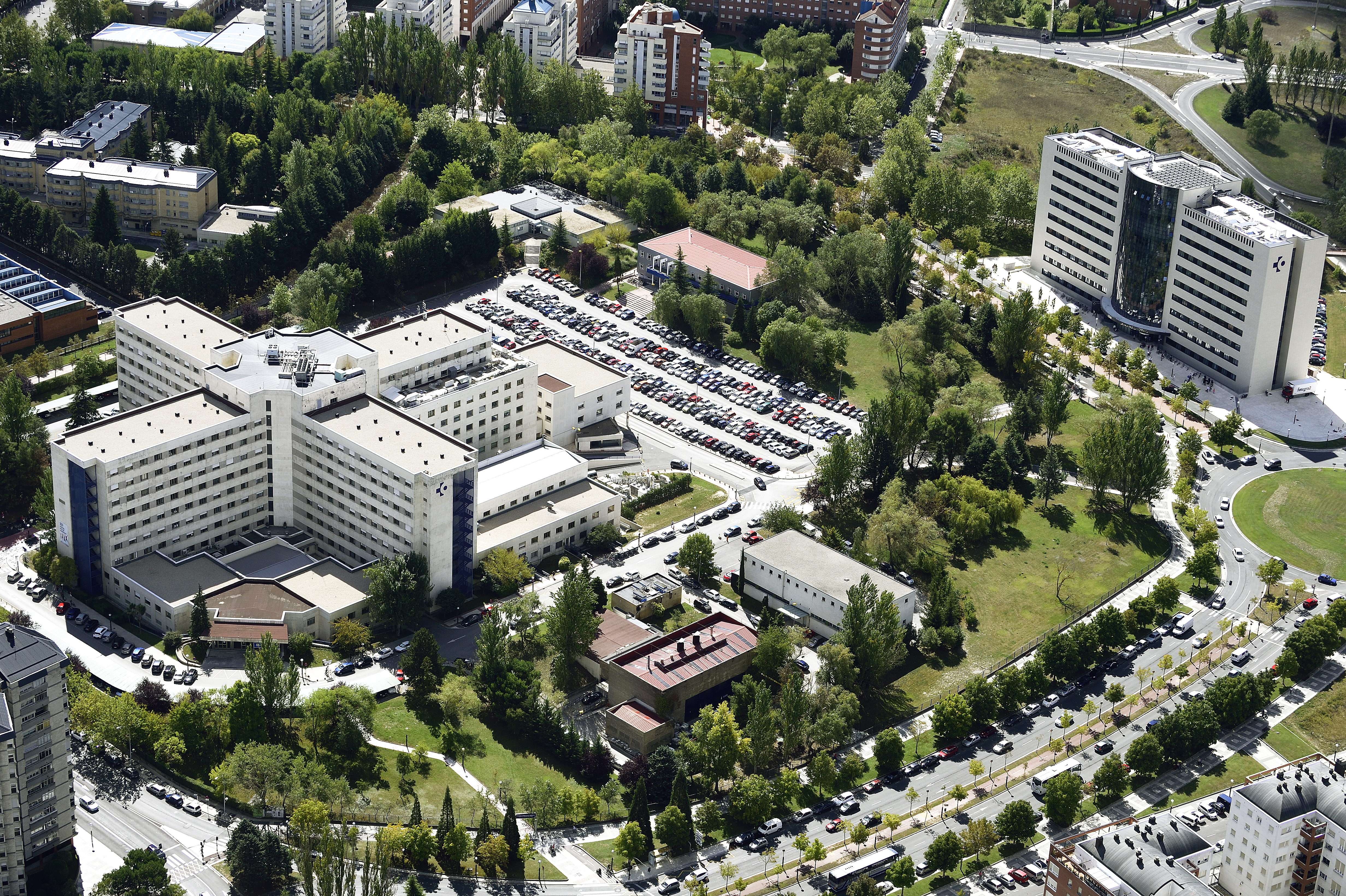 Hospital Universitario de Araba (sede Txagorritxu y edificio de Consultas externas)